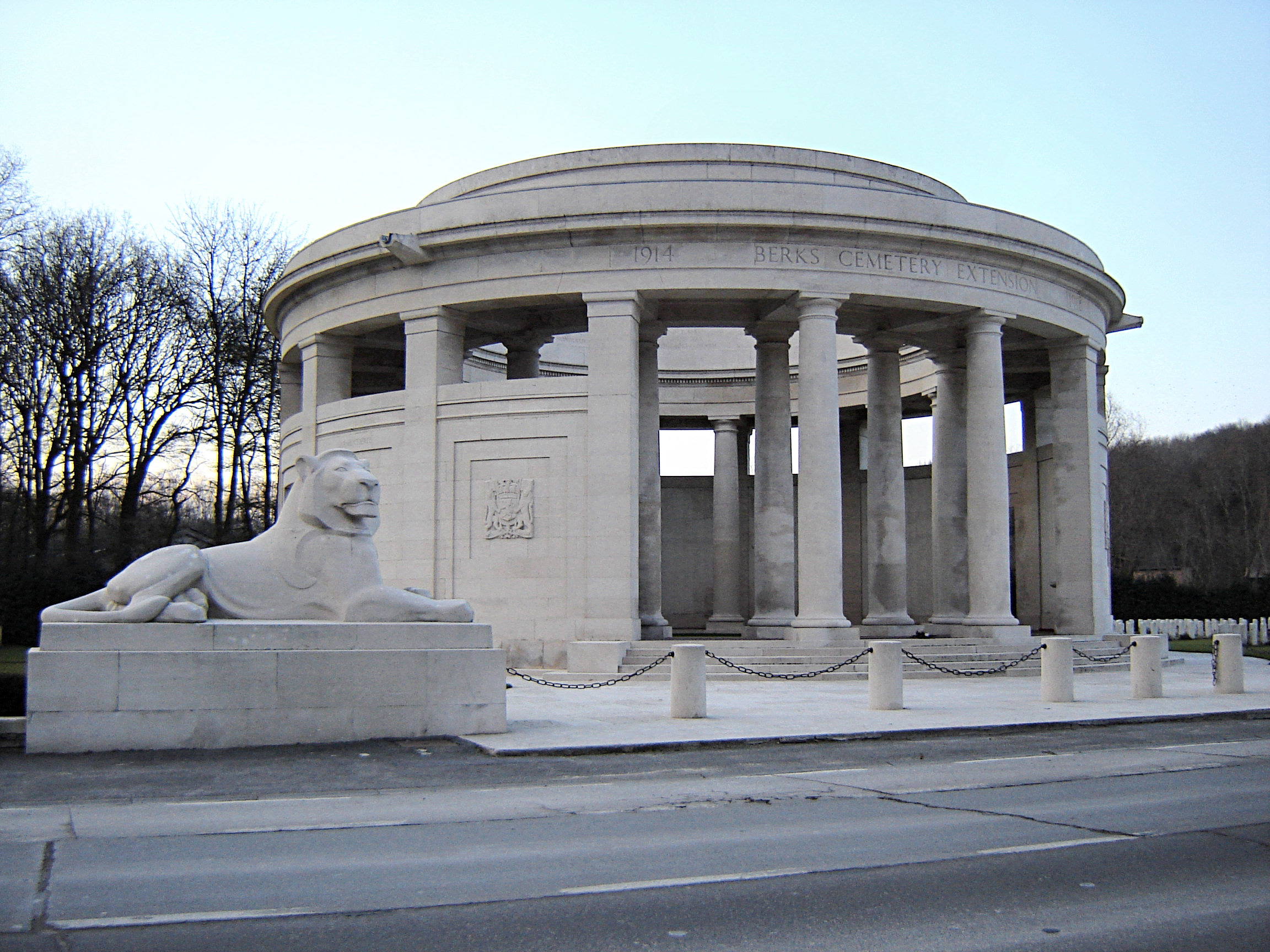 Ploegsteert Memorial op het Berks Cemetery Extension; monument voor meer dan 11.000 gesneuvelde Britse soldaten met geen gekend graf.